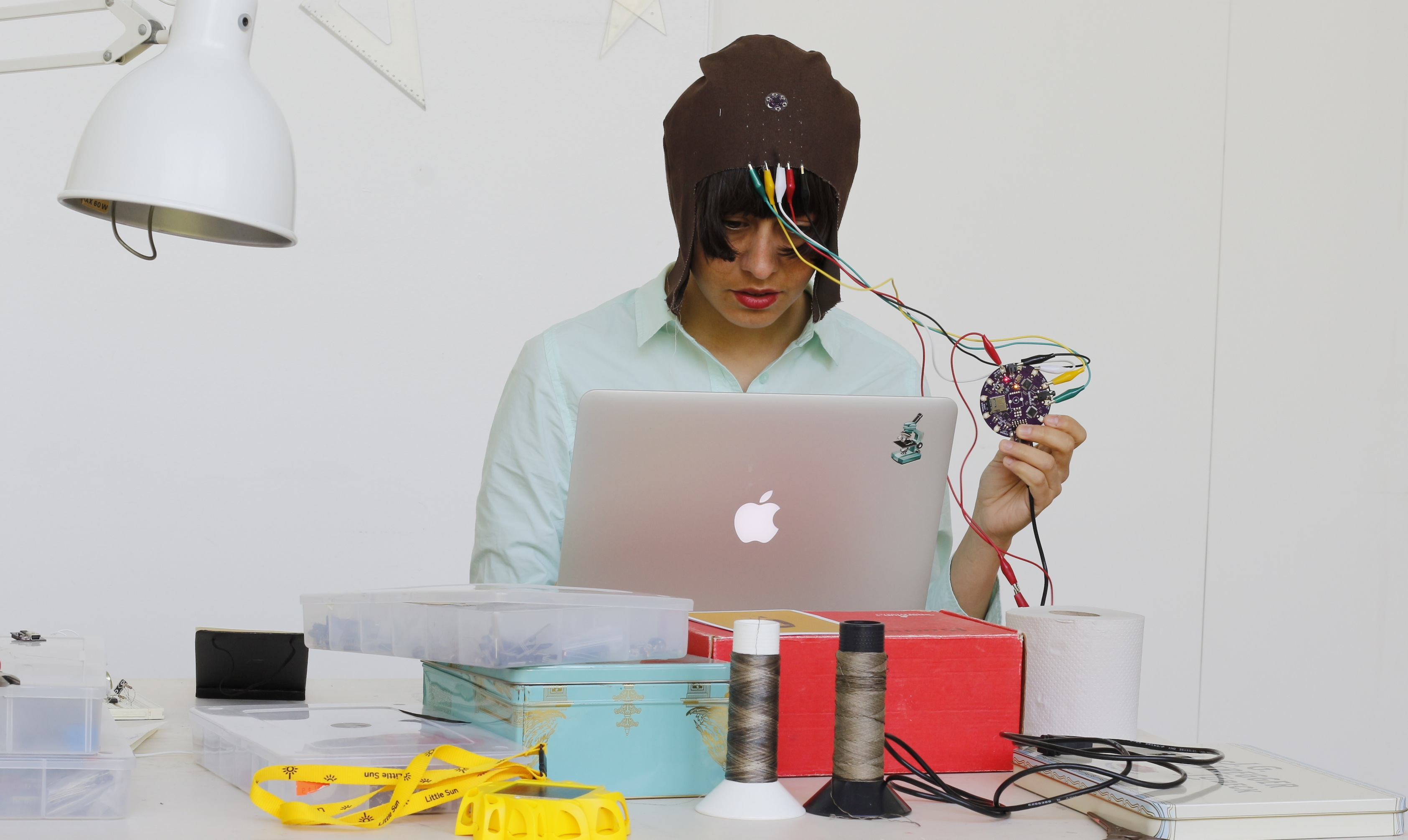 Amor trabajando